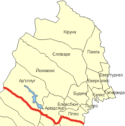 Комуни лену Норрботтен, Швеція. Використано карту File:Norrbotten County.png.